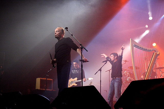 Alan Stivell au grand fest-noz du festival Yaouank à Rennes le 21 novembre 2009 accompagné par le chanteur breton Dom Duff.